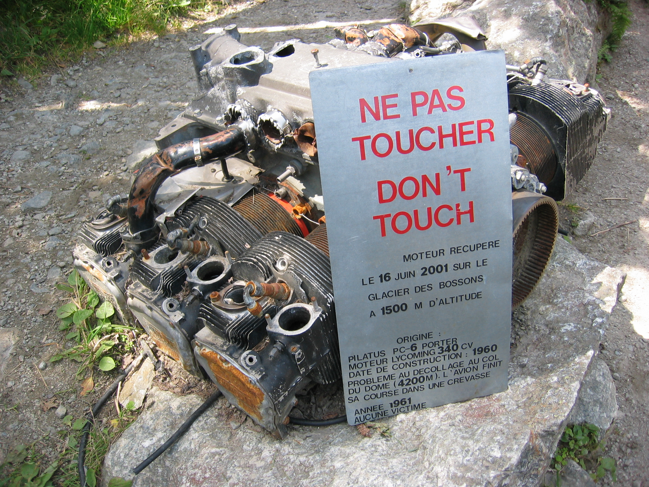 Moteur d'un Pilatus PC-6 Porter (s/n 343 / immatriculation HB-FAZ) d'Air Alpes/Pilatus retrouvé le 16 juin 2001 sur le glacier des Bossons, Chamonix, France. L'appareil s'était écrasé au décollage le 2 septembre 1961 au col du Dôme du Gouter.